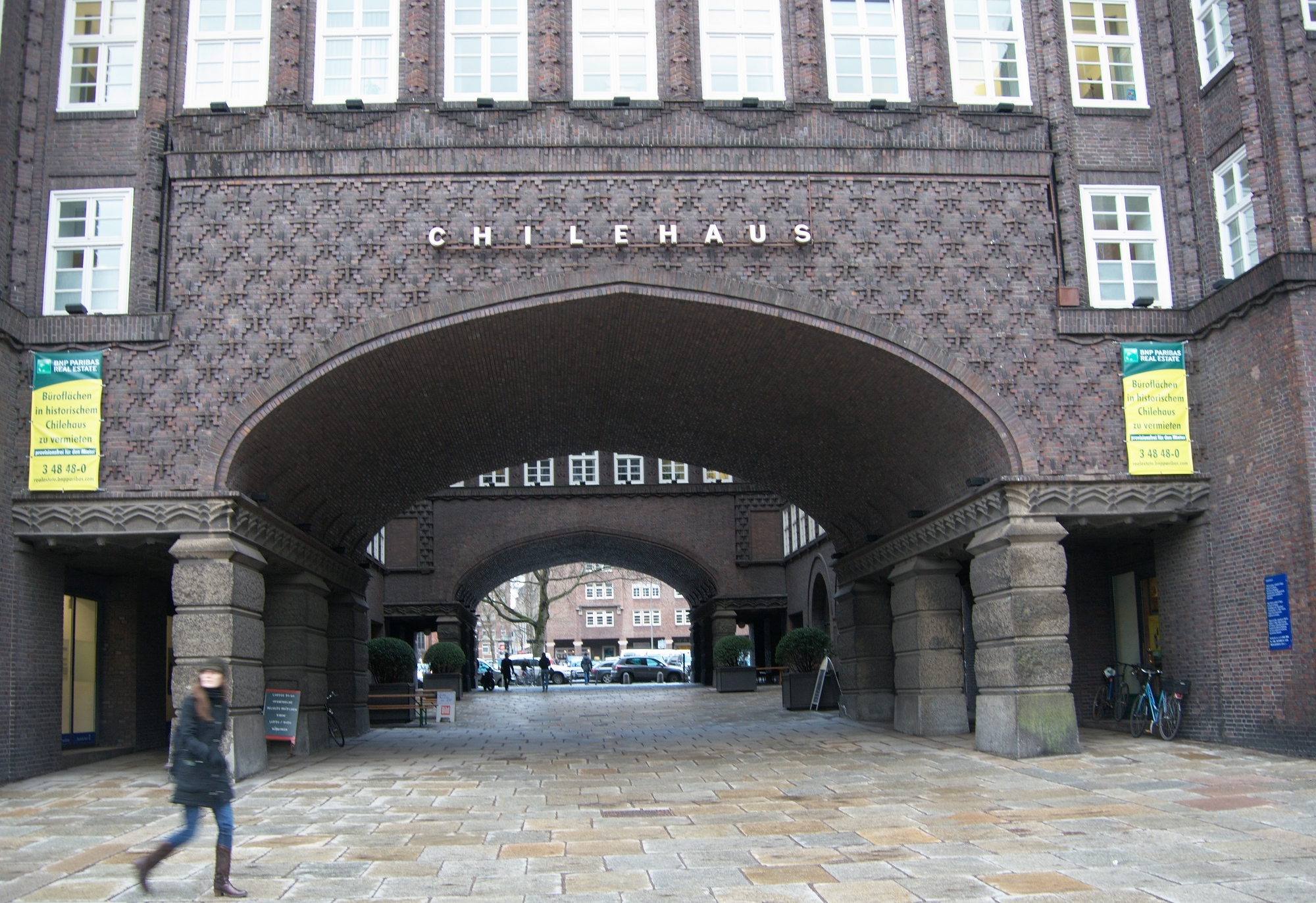 Chilehaus - überbaute Fischtwiete von Süden This is a photograph of an architectural monument.